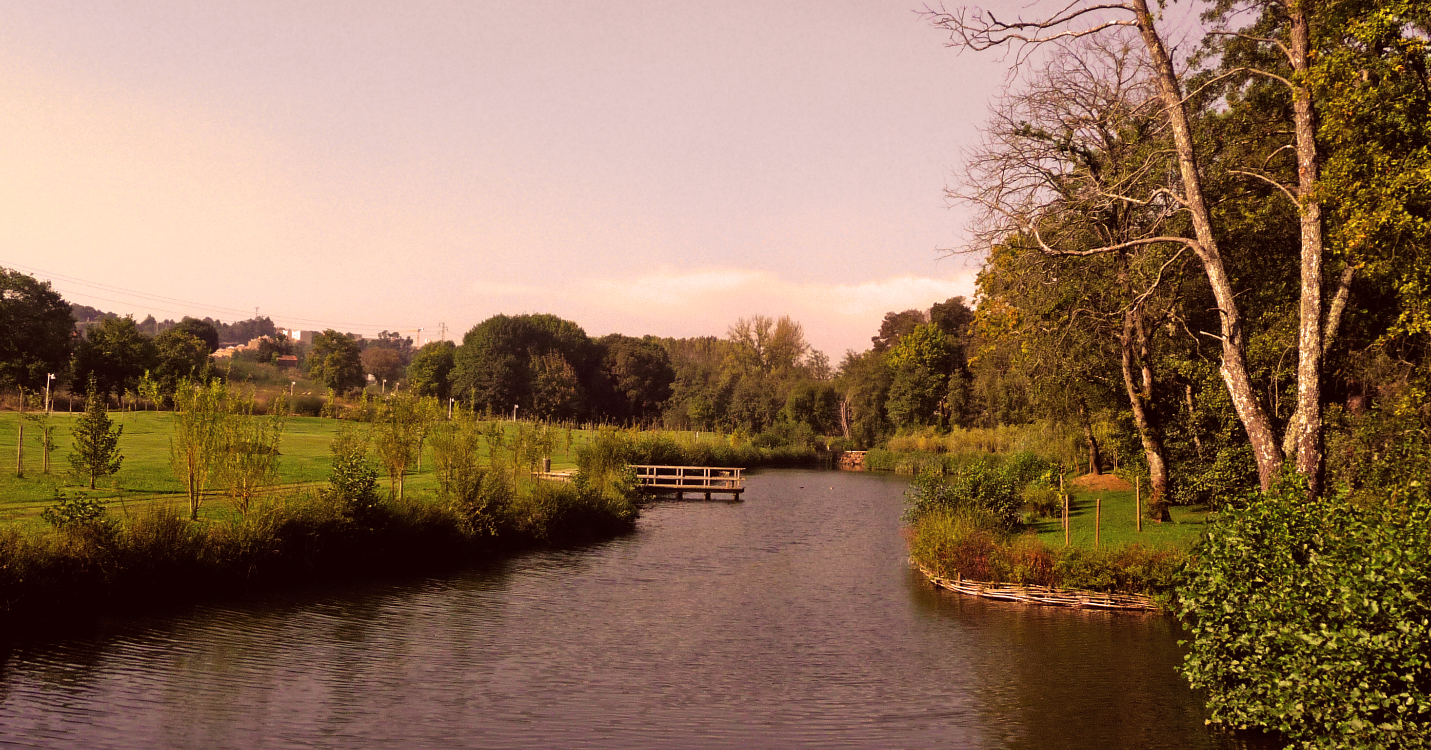 São João da Madeira - Parque Urbano do Rio Ul (porção norte)